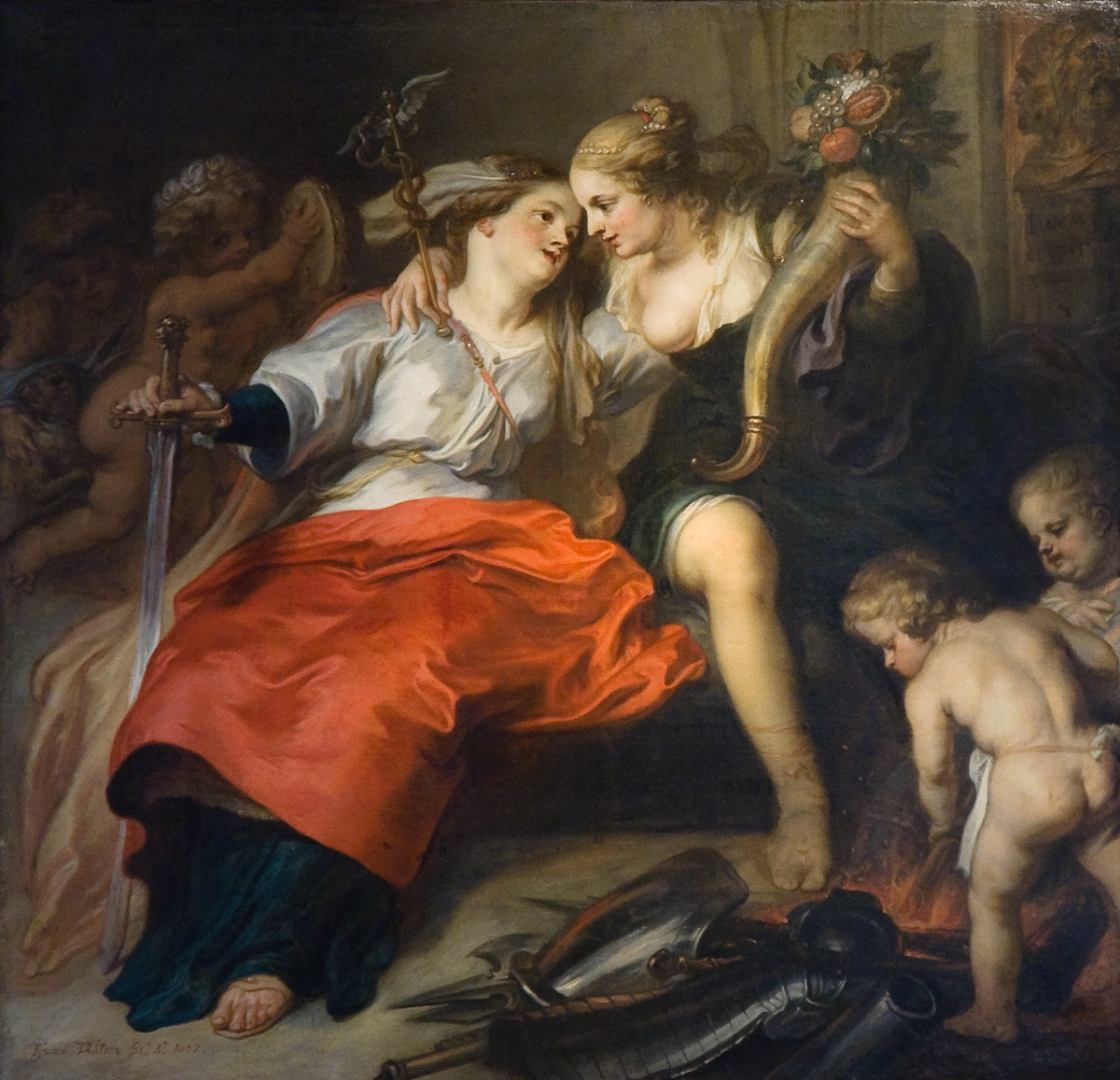 Allegorie op de terugkeer van de vredelabel QS:Lnl,"Allegorie op de terugkeer van de vrede"